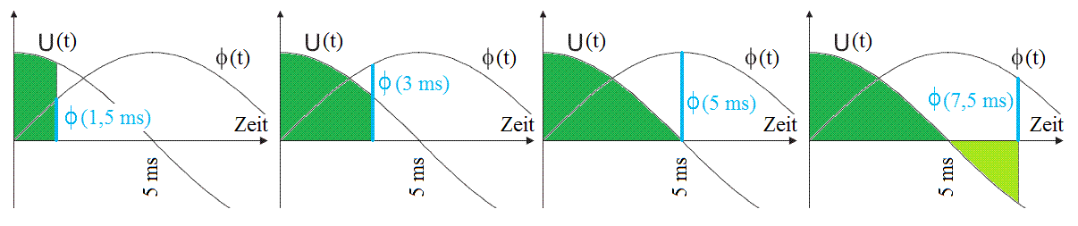 Graphisches Integrieren einer Cos-Funktion